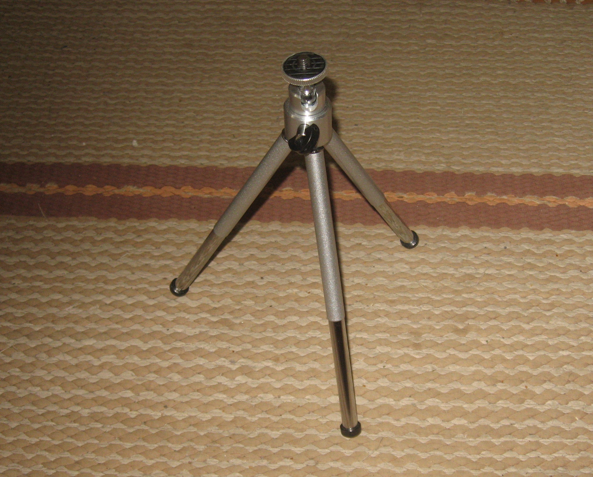 Kameran jalusta